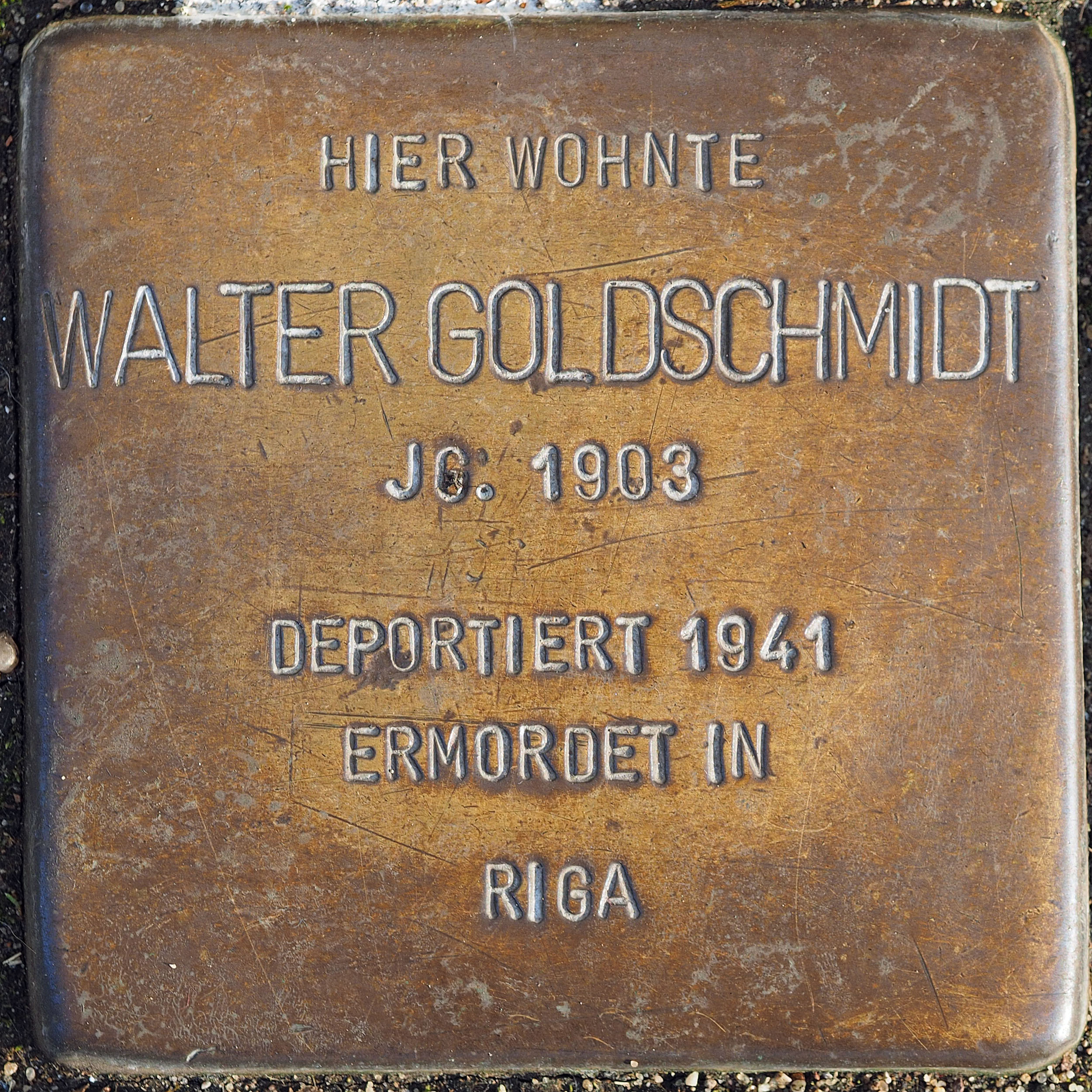 Stolperstein DU 289: Goldschmidt, Walter